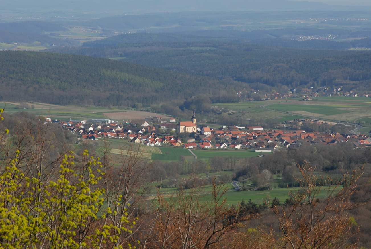 Oberelsbach/Rhoen, vom Gangolfsberg